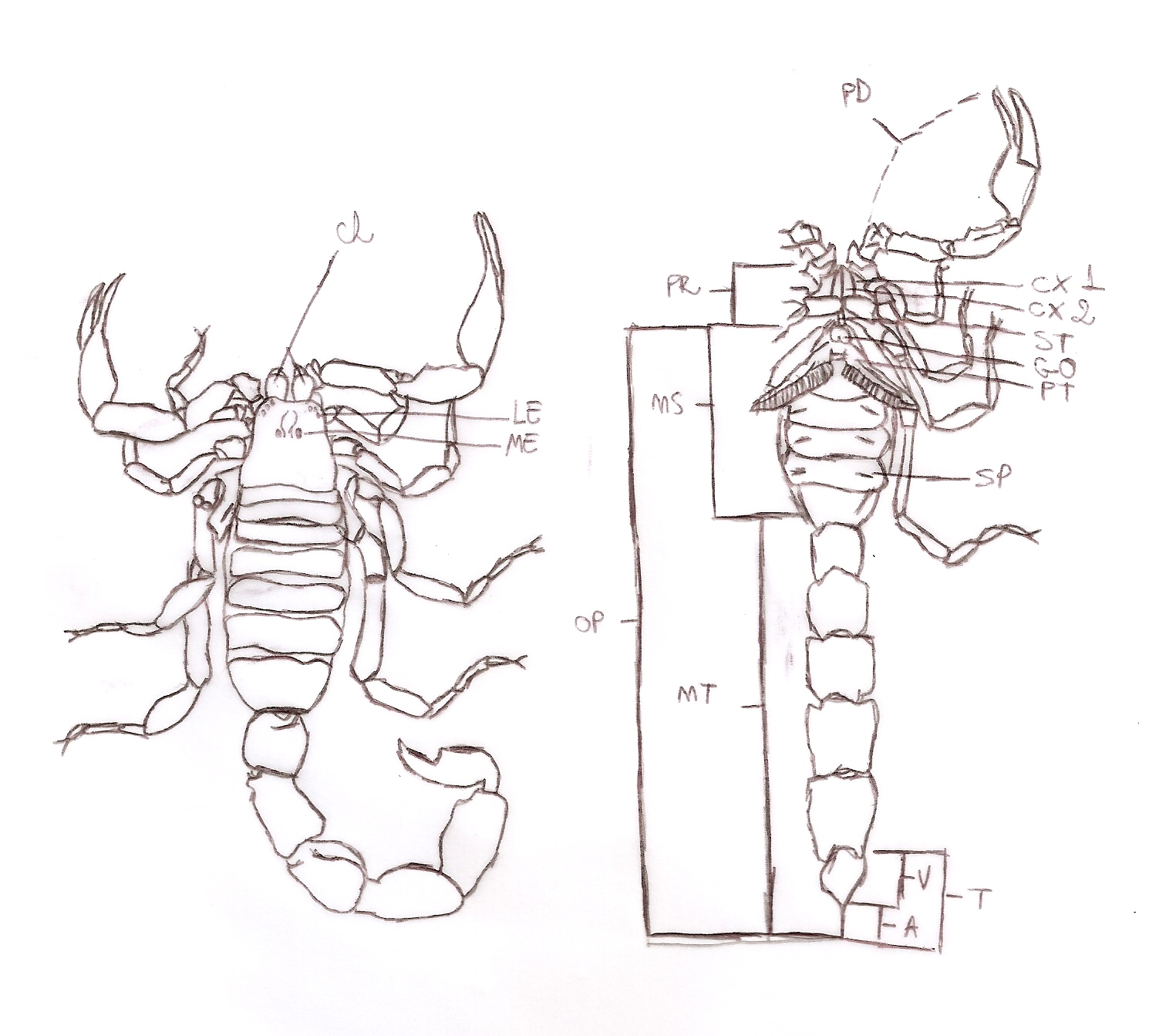 Ch - quelíceras LE - olhos laterais ME - olhos medianos PR - prossoma OP - opistossoma MS - mesossoma MT - metassoma CX - coxas das patas ST - esternito GO - opérculo genital PT - pentes] SP - aberturas dos pulmões foliáceos T - telsón V - glândula de veneno A - aguilhão